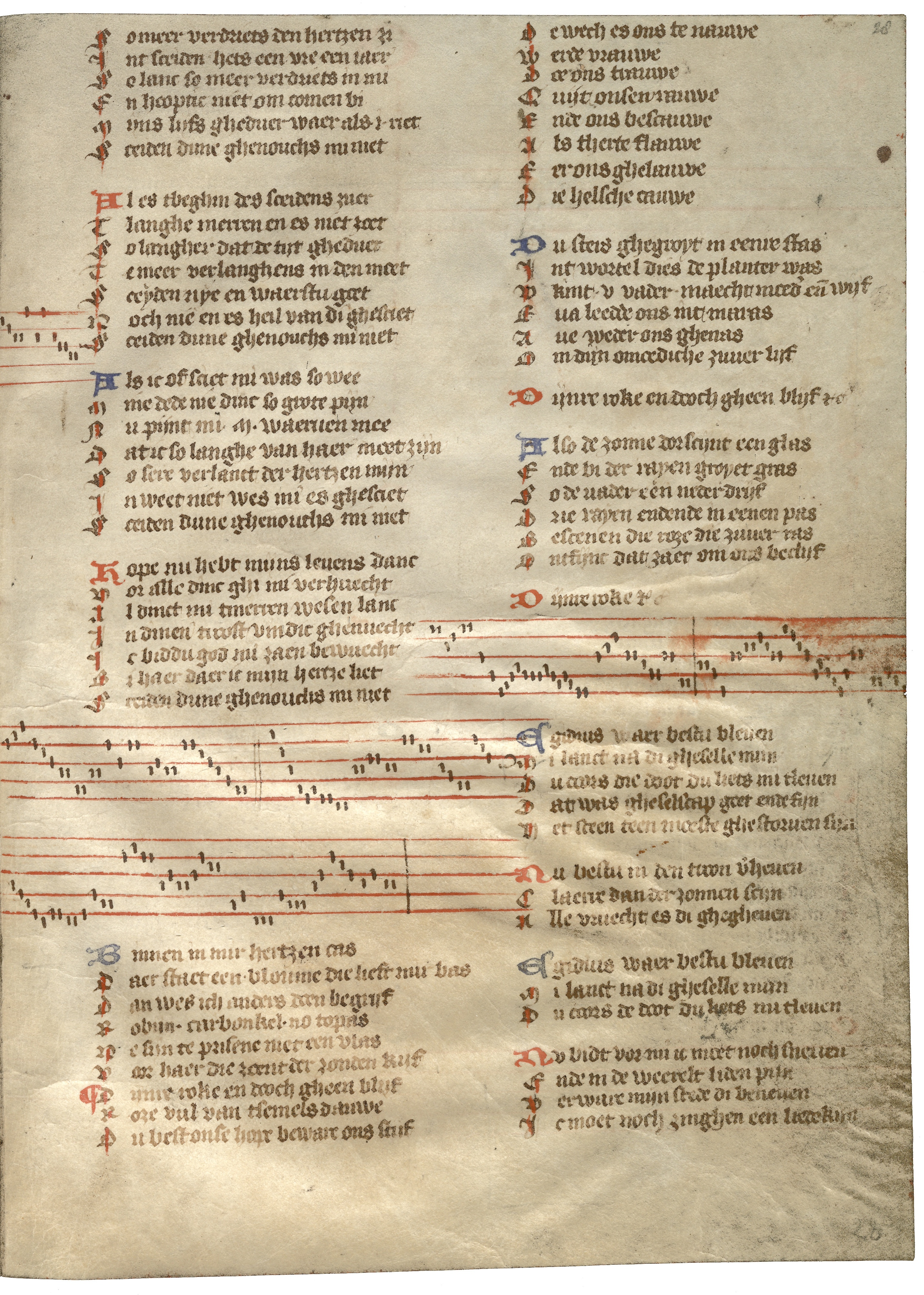 Bladzijde 28r (Egidiuslied) van het Gruuthuuse-handschrift ([1])